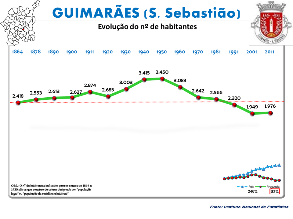 Evolução da População 1864 / 2011